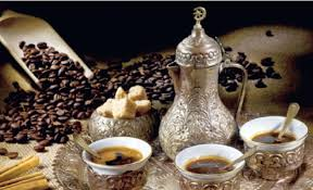 قهوة عربية أصيلة